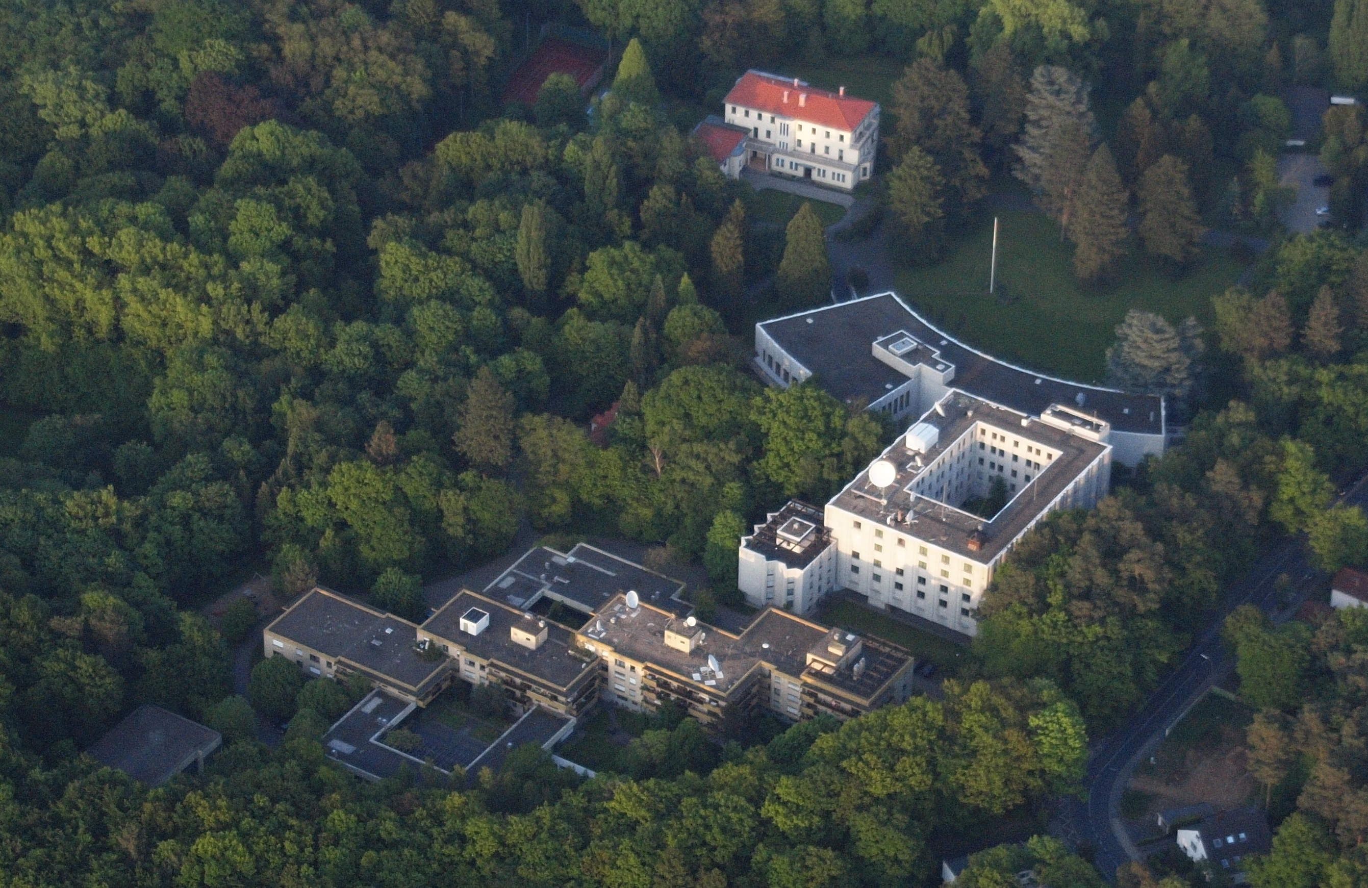 Viktorshöhe, Bad Godesberg